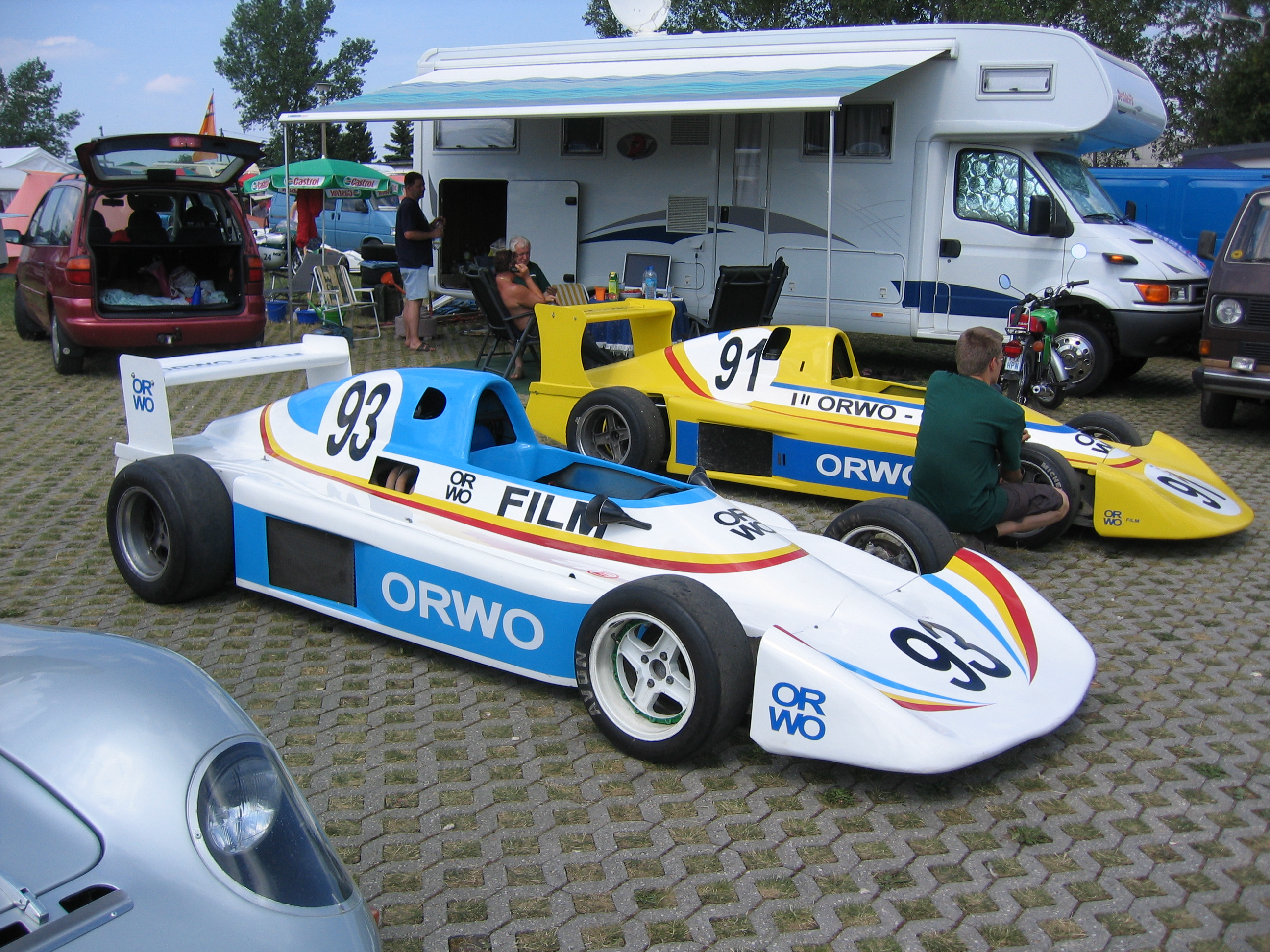 Zwei Melkus MT77 im Fahrerlager von Schleiz